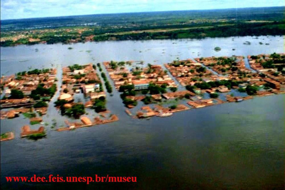 Velha Marabá durante enchente de 1979-1980; ao fundo o distrito da Cidade Nova.